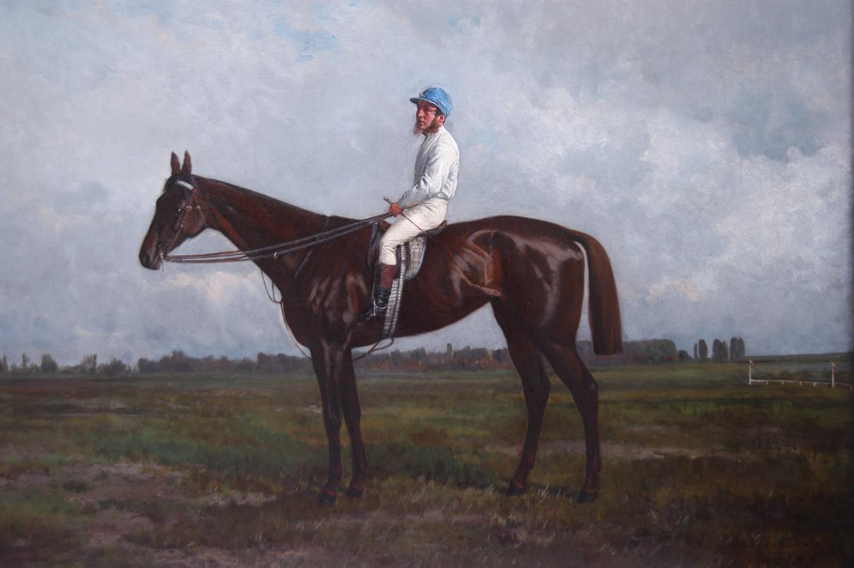 Pállik Béla: Kincsem zsokéval a hátán, 1878, festmény a Blaskovics múzeumban